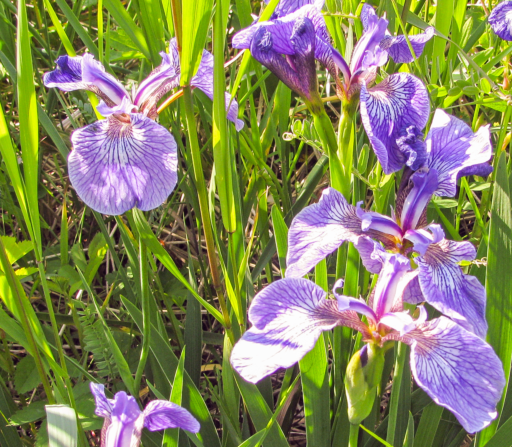 Iris versicolor, emblème du Québec, au parc national du Bic This photo was taken in a protected area in Canada, Wikidata item Bic National Park (Q170269)